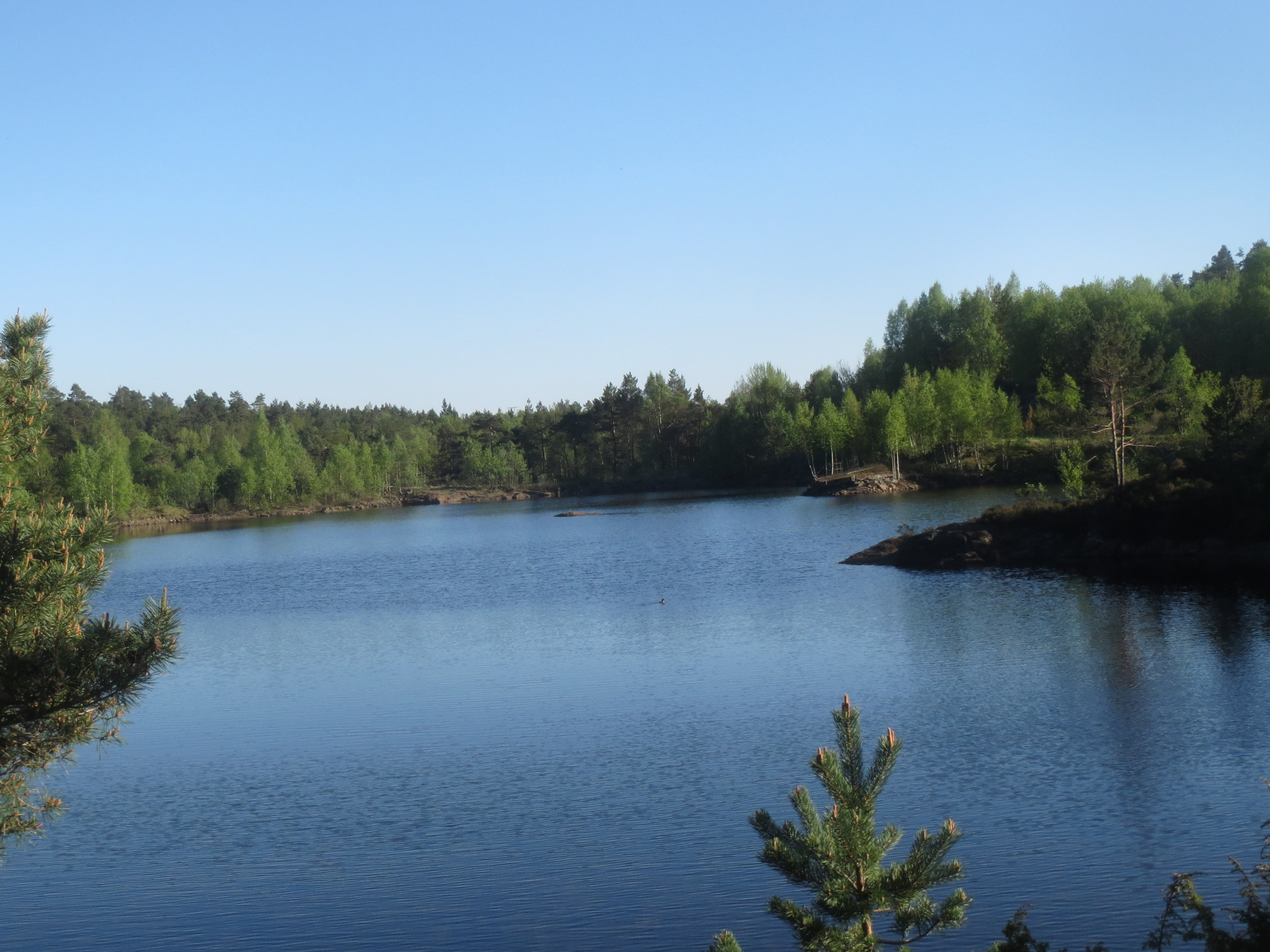 Kyrtjønn, et tjern i Kristiansand